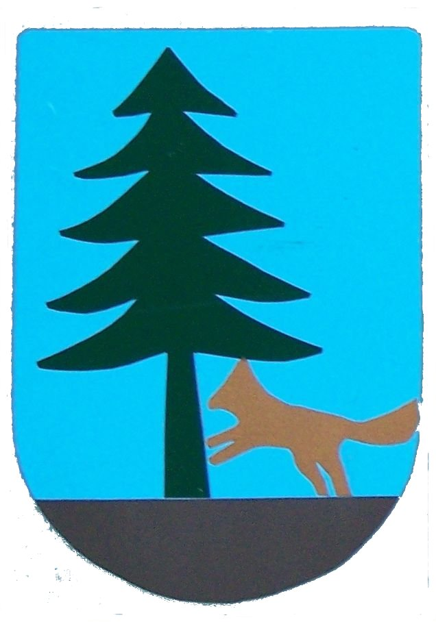 Tak wyglądał Herb gminy Jedłownik obecnie dzielnica w Wodzisławia